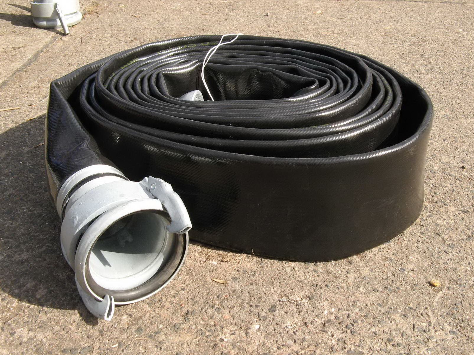 Druckschlauch für Schmutzwasserkreiselpumpe